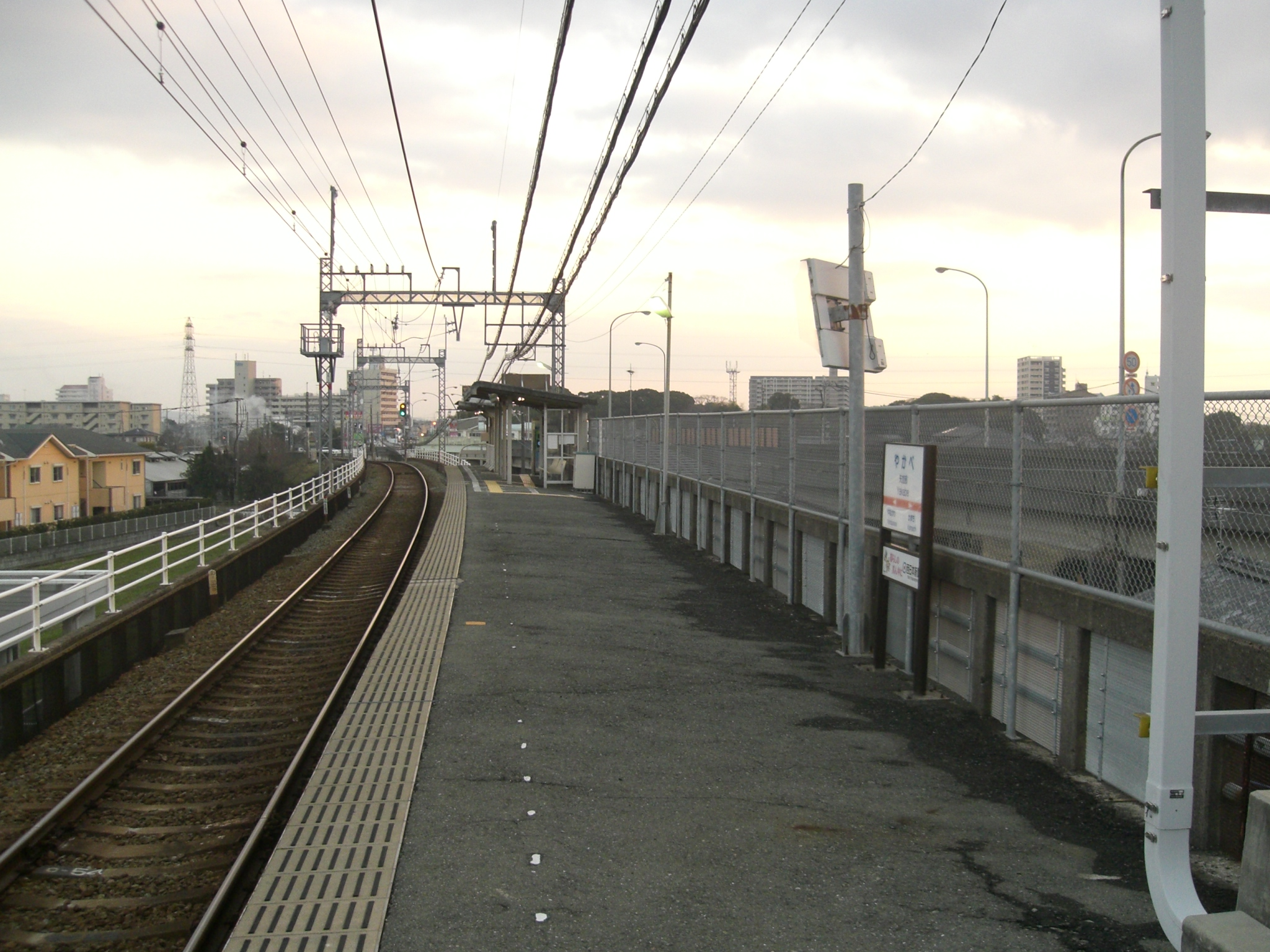 投稿者自身が撮影。